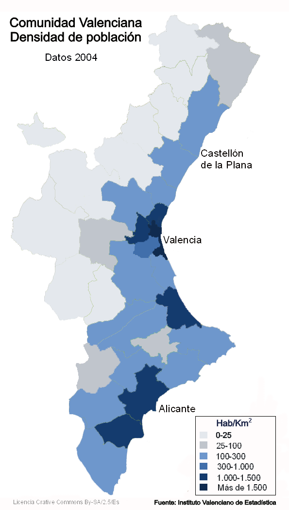 Mapa de densitat de població del País Valencià (Països Catalans). Made By Fuster